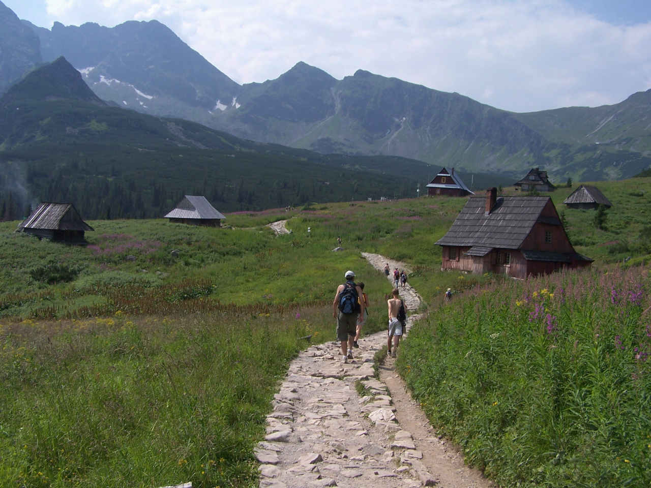 Dolina Gąsienicowa (Tatra Mountains)